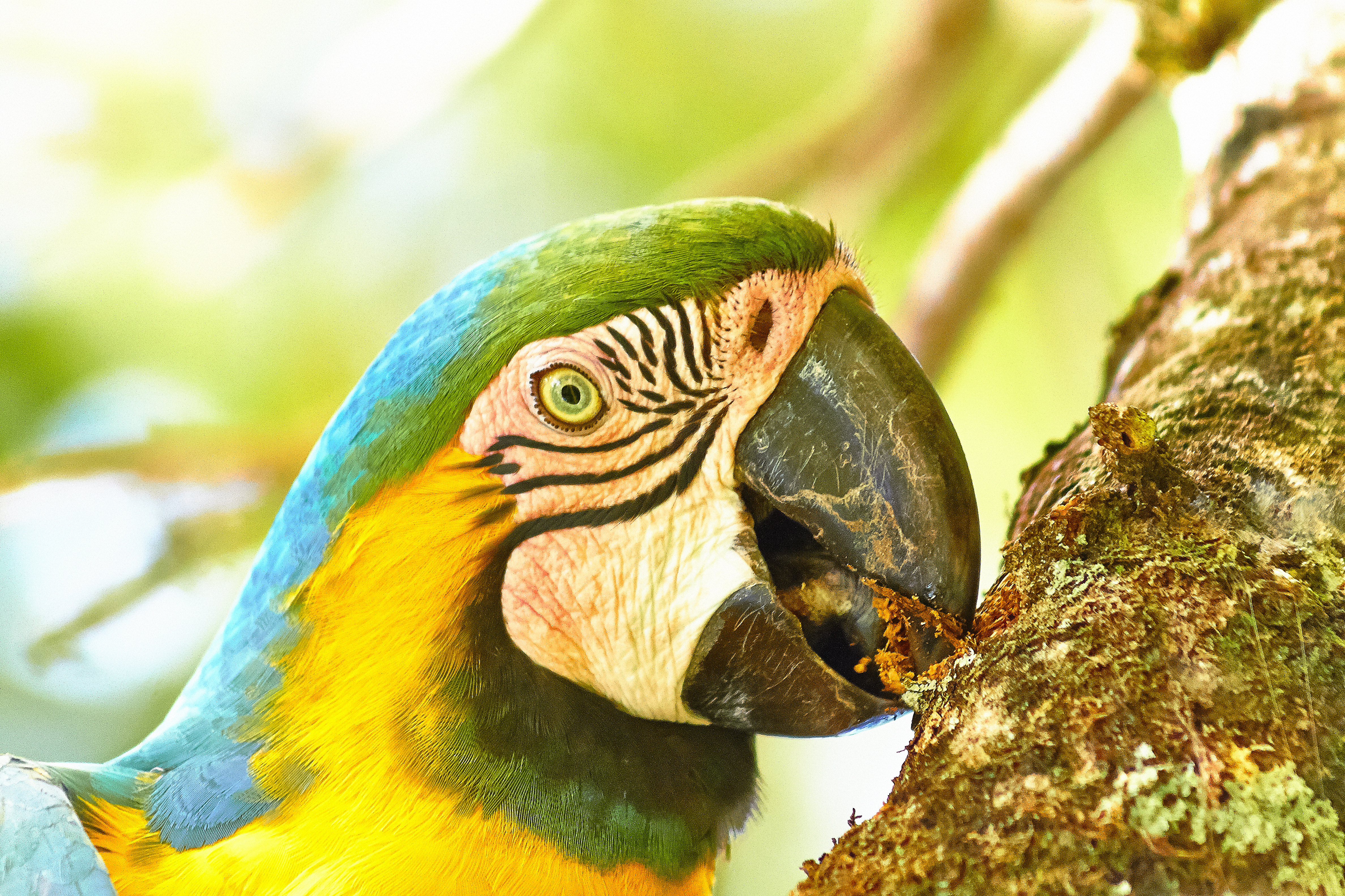 El guacamayo azulamarillo (Ara ararauna),2 también conocido como guacamayo azul y amarillo, papagayo amarillo o paraba azul amarillo,3 es una especie de ave psittaciforme de la familia de los loros endémica de América del Sur. Su área de distribución comprende desde Panamá hasta el norte de Paraguay y Bolivia,1 pasando por toda la cuenca amazónica. En cautividad se reproducen fácilmente; en libertad viven en grupos de 25-30 ejemplares. Este loro es el representante inconfundible de los guacamayos, loros con poderosos picos y colas muy largas.